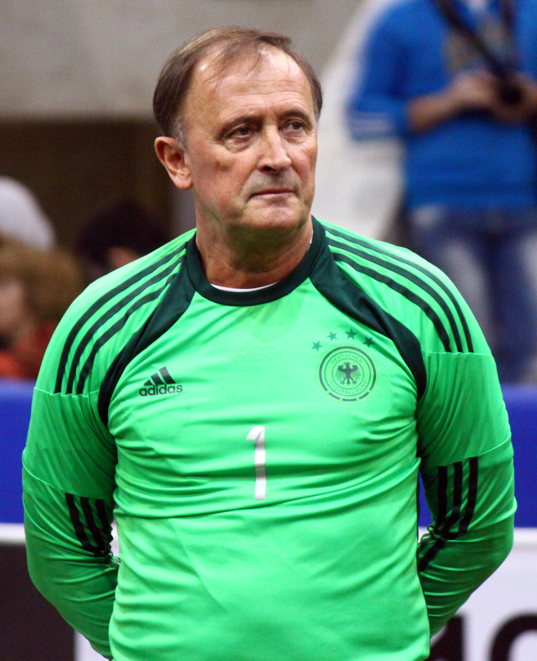 Дитер Бурденски. Кубок Легенд 2015